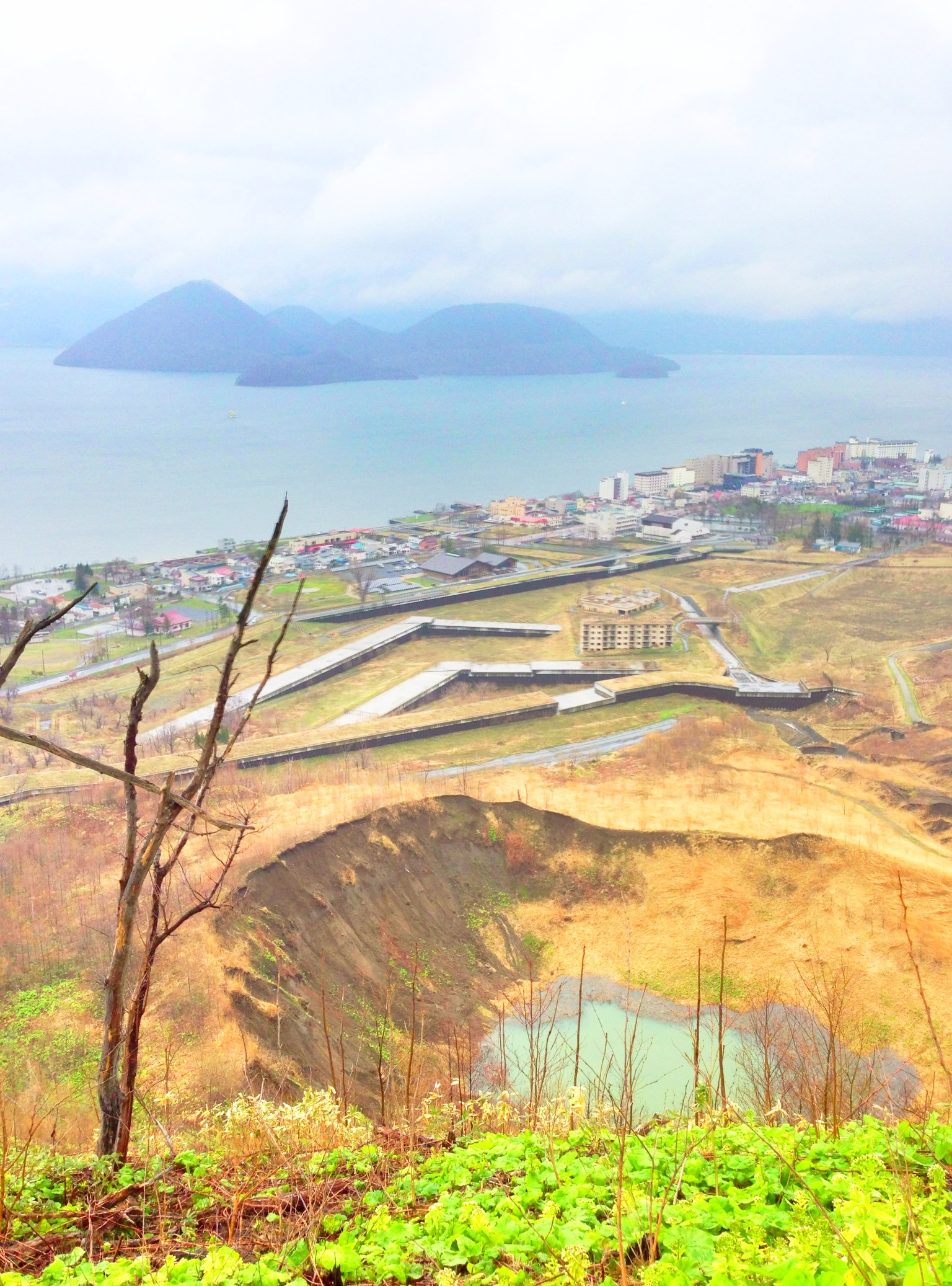 洞爺湖と有珠山の金毘羅山火口、廃棄された被災建物と洞爺湖温泉街（2013年撮影）